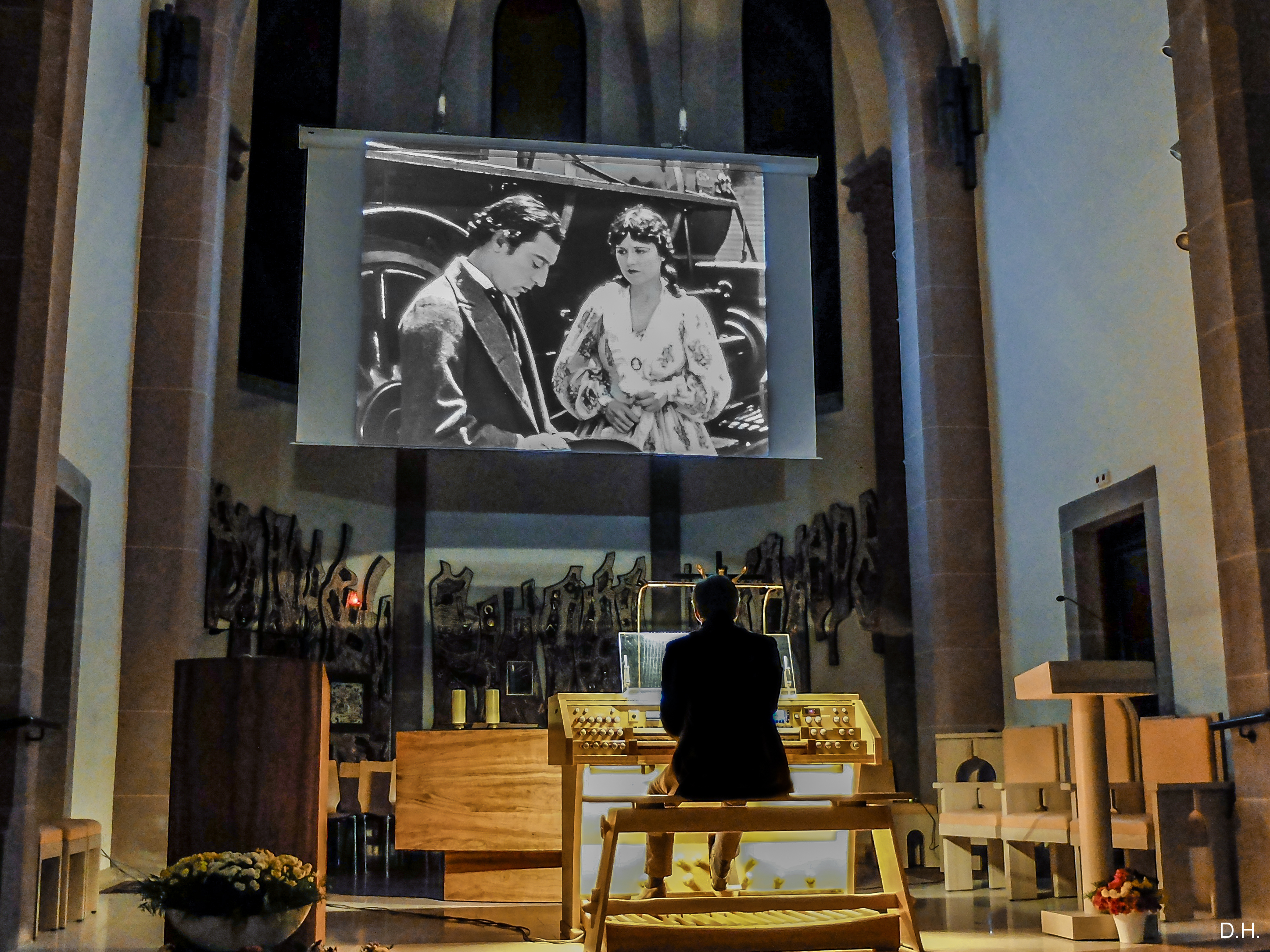 Projection du film à l'église Saint-Denis de Gerstheim le 16 novembre 2019 avec une improvisation à l'orgue par Thierry Mechler